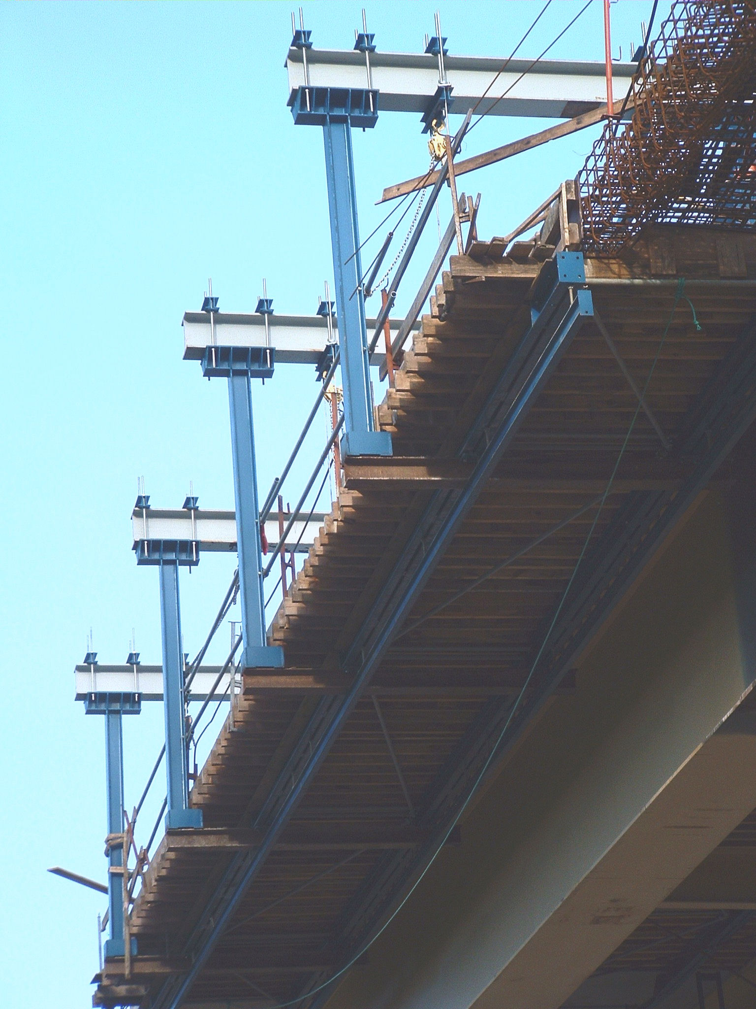 Autoroute A89 - Viaduc de la Vézère-Corrèze - Equipage mobile du hourdis - Charpente